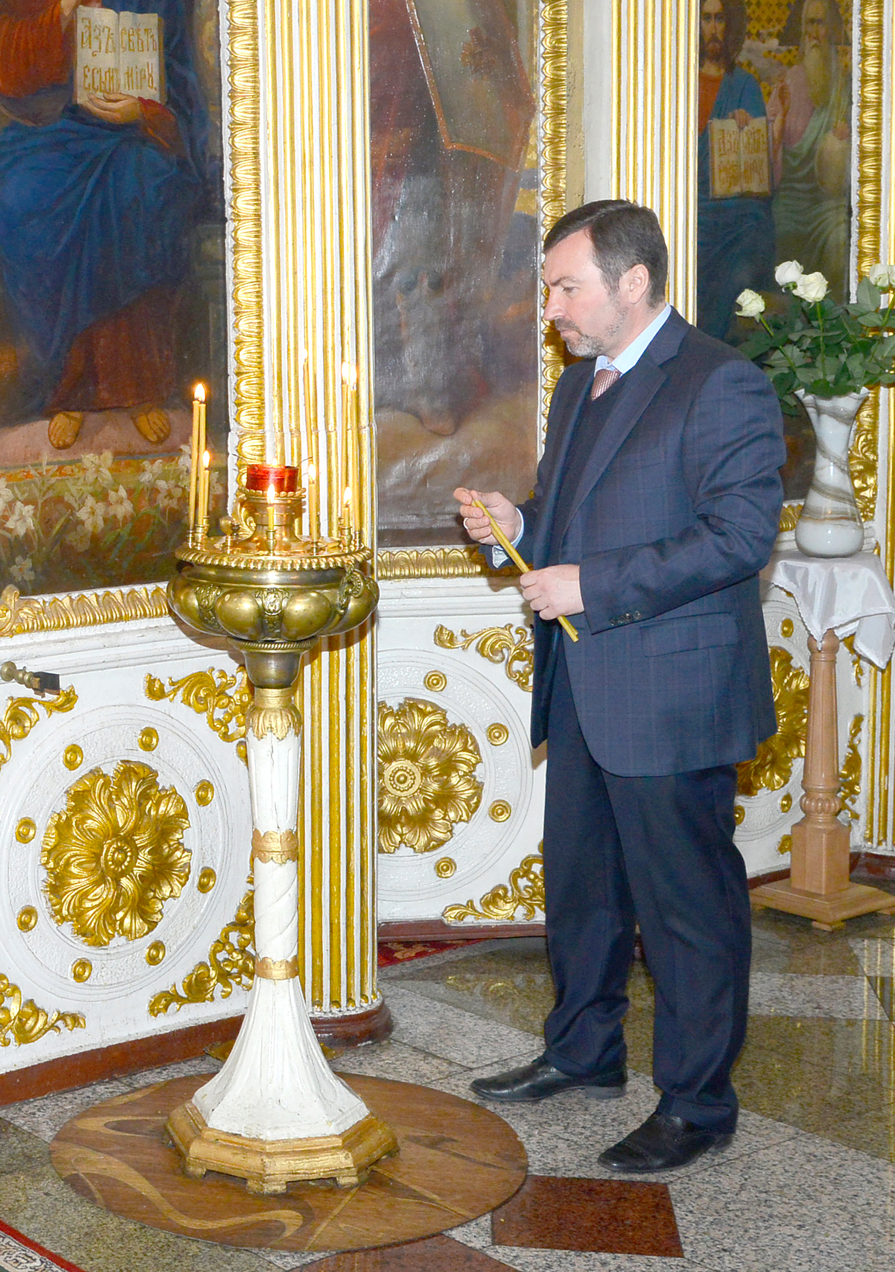 г. Днепр , фото Вадим Чуприна